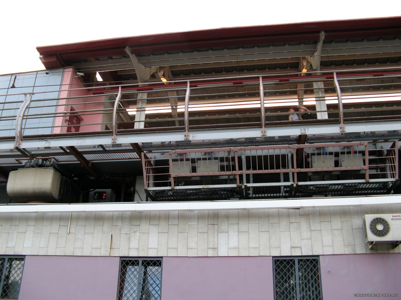 Тяговая электрическая подстанция на станции Выставочный центр Московского монорельса